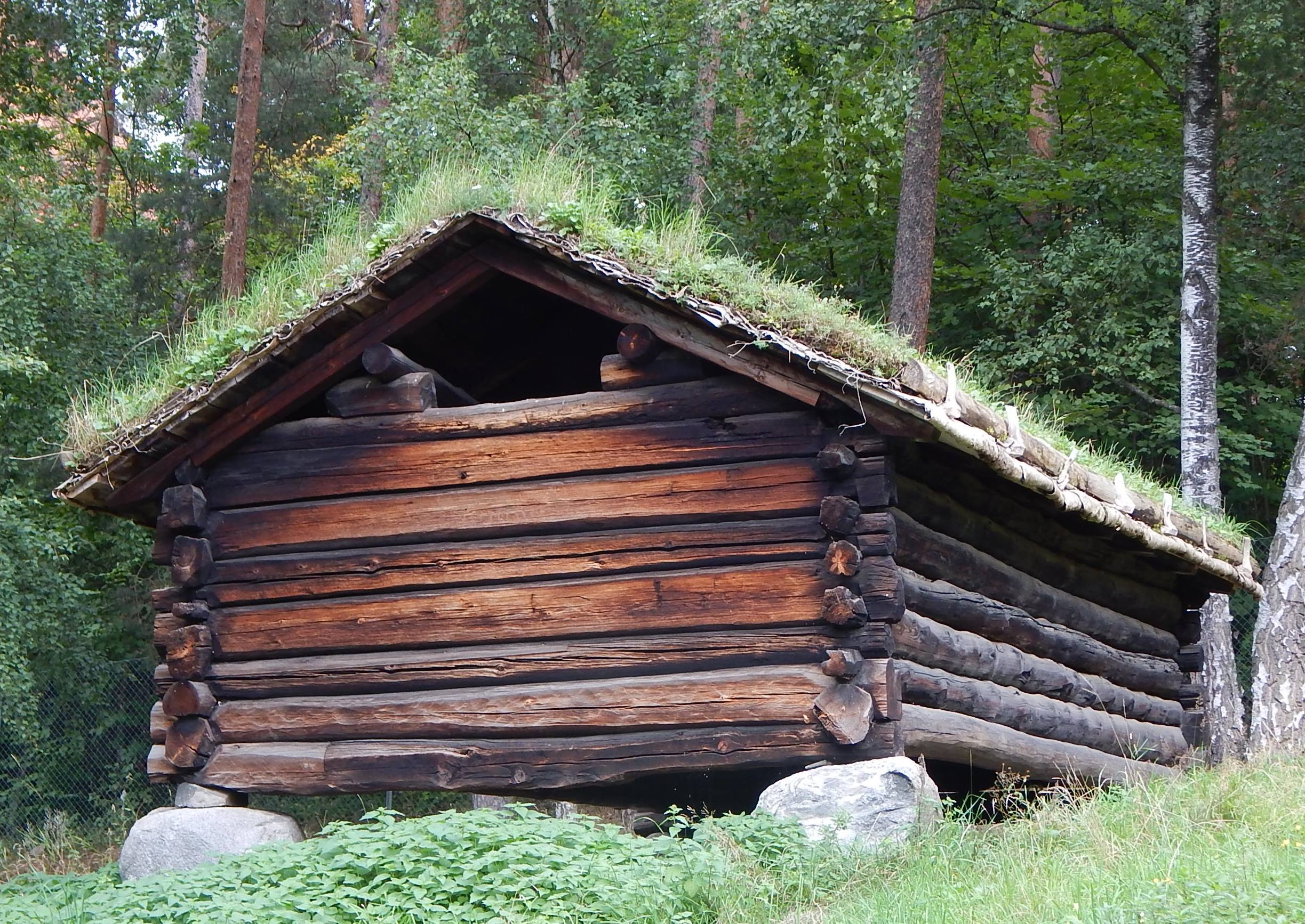 Høybu fra Haupelid i Åseral (NF65) på Norsk Folkemuseum